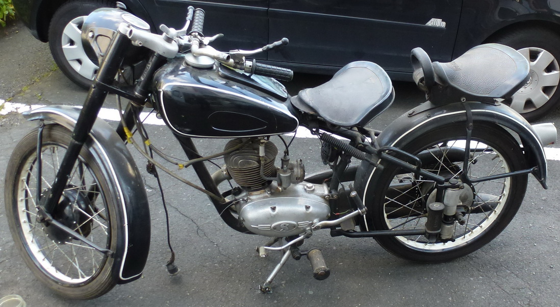 Geier 1953 150ccm 6,5 PS